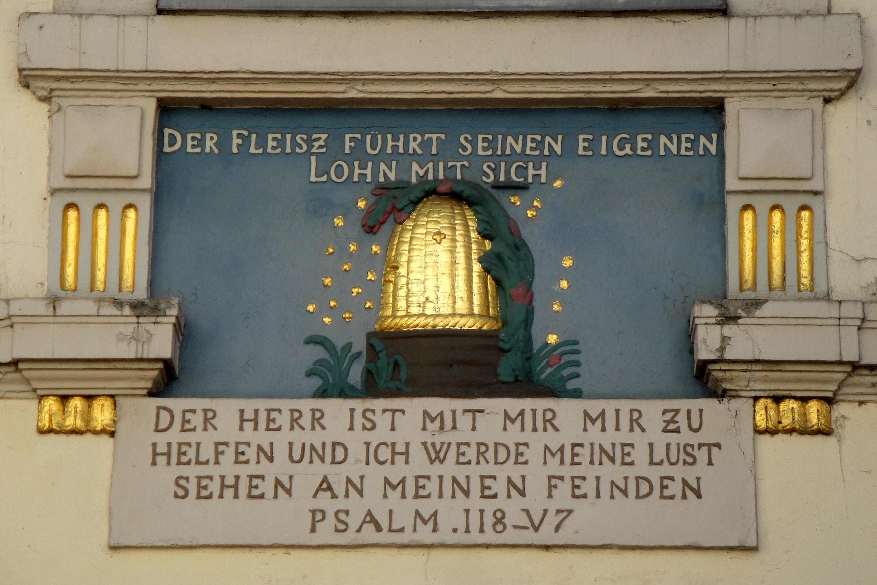 Bienenstock (Bienenkorb) als Hauszeichen, Antiquariat Wenner, Osnabrück